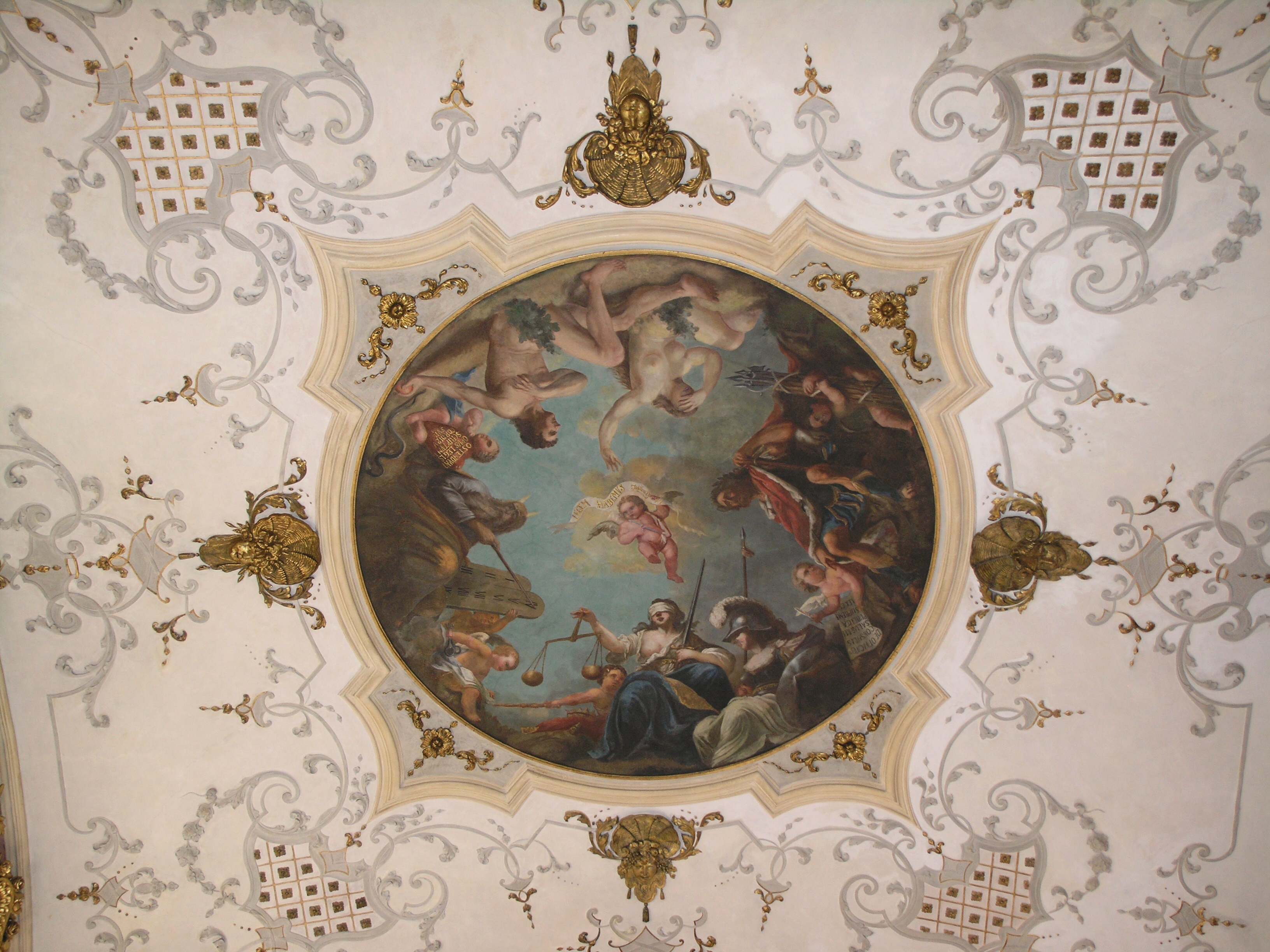 Praha, Novoměstská radnice - kaple Nanebevzetí Panny Marie, stropní freska